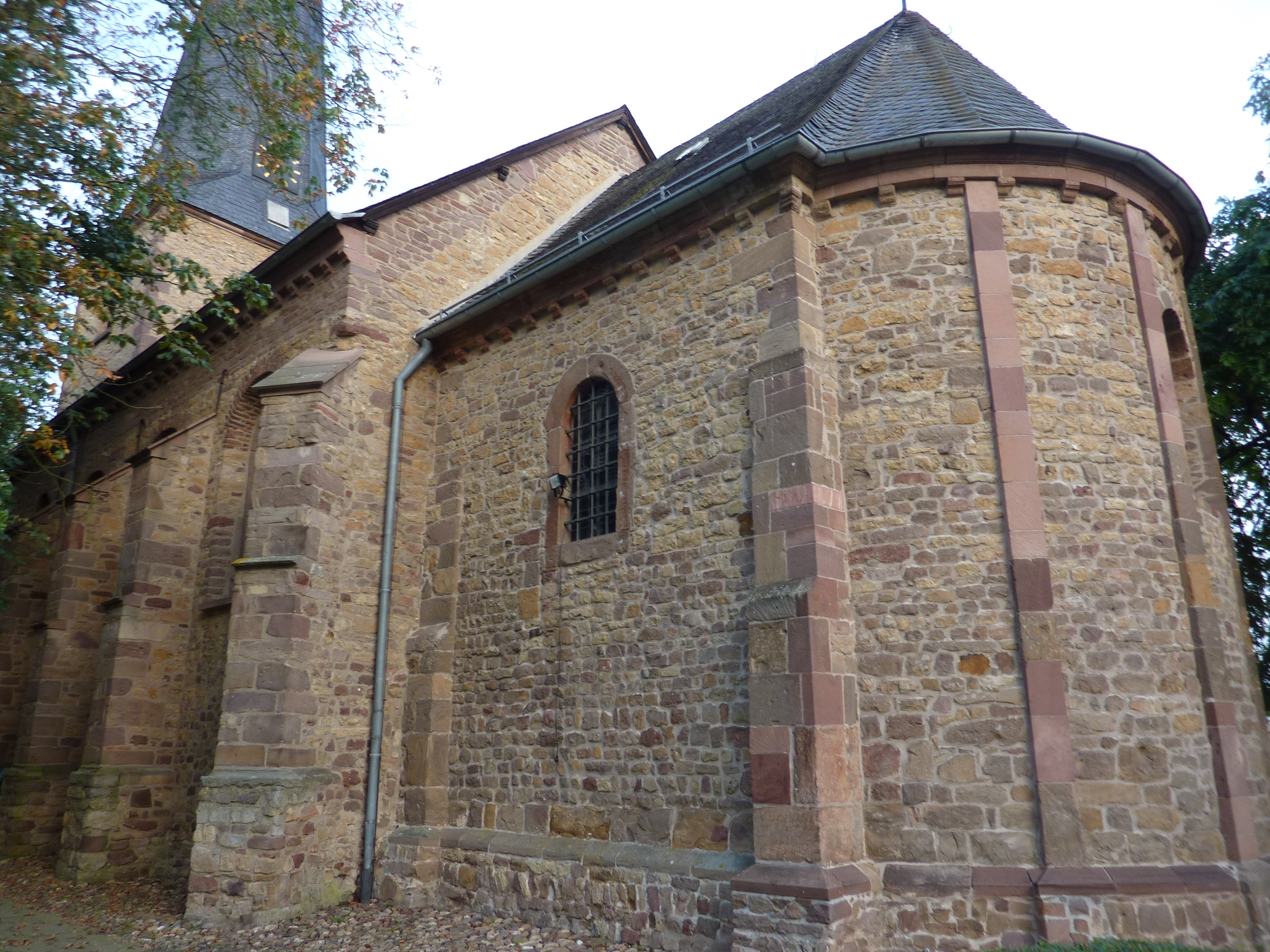 St. Gangolfus (Soller)